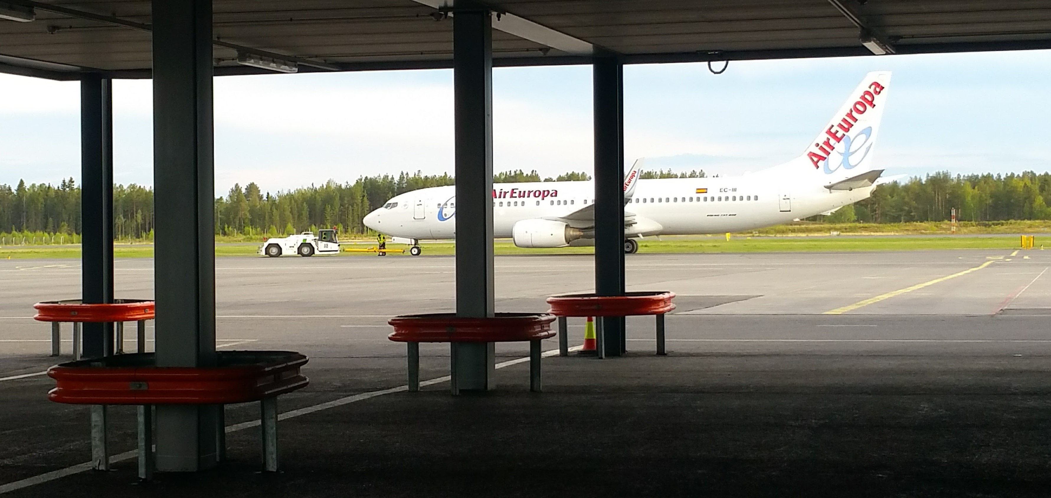 Air Europan Boeing 737 lähdössä Oulusta Malagaan kesäkuussa 2017